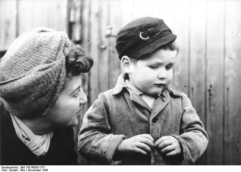 ADN-ZB/Donath Berlin, November 1945 Durch einen Aufruf des antifaschistitschen Frauenausschusses vom Bezirksamt Lichtenberg konnten 180 Flüchtlinge und Waisenkinder, die vorübergehend in Baracken in der Möllerdorfstr. untergebracht waren, bei Berliner Familien ein neues Zuhause finden. UBz.: Einer der kleine Waisen mit seiner neuen Mutti.